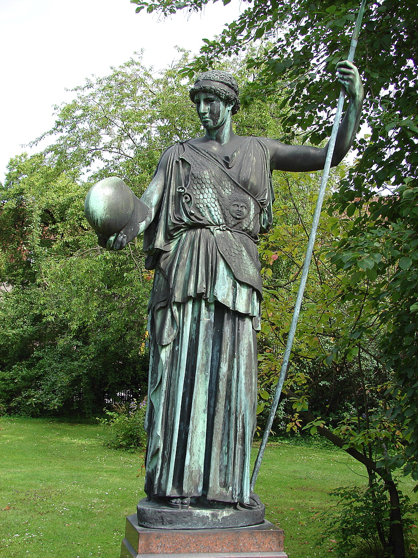 Athena Lemnia, afstøbning af romersk kopi efter græsk original fra ca. 440 f.Kr., Phidias, Botanisk Have, København